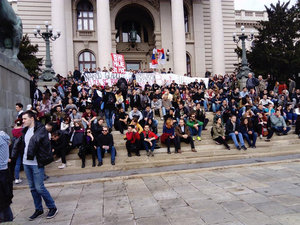 Okupljanje na stepeništu